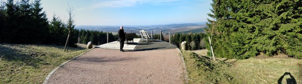 Aussichtsplattform "Tiefenrother Höhe" am Rothaarsteig nahe Wilgersdorf (Wilnsdorf)